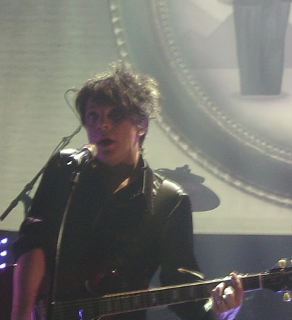 Photographie de Nicola Sirkis au concert du 17 décembre 2005 à Bruxelles (Orangerie du Botanique). Je suis l'auteur du fichier (photographie).